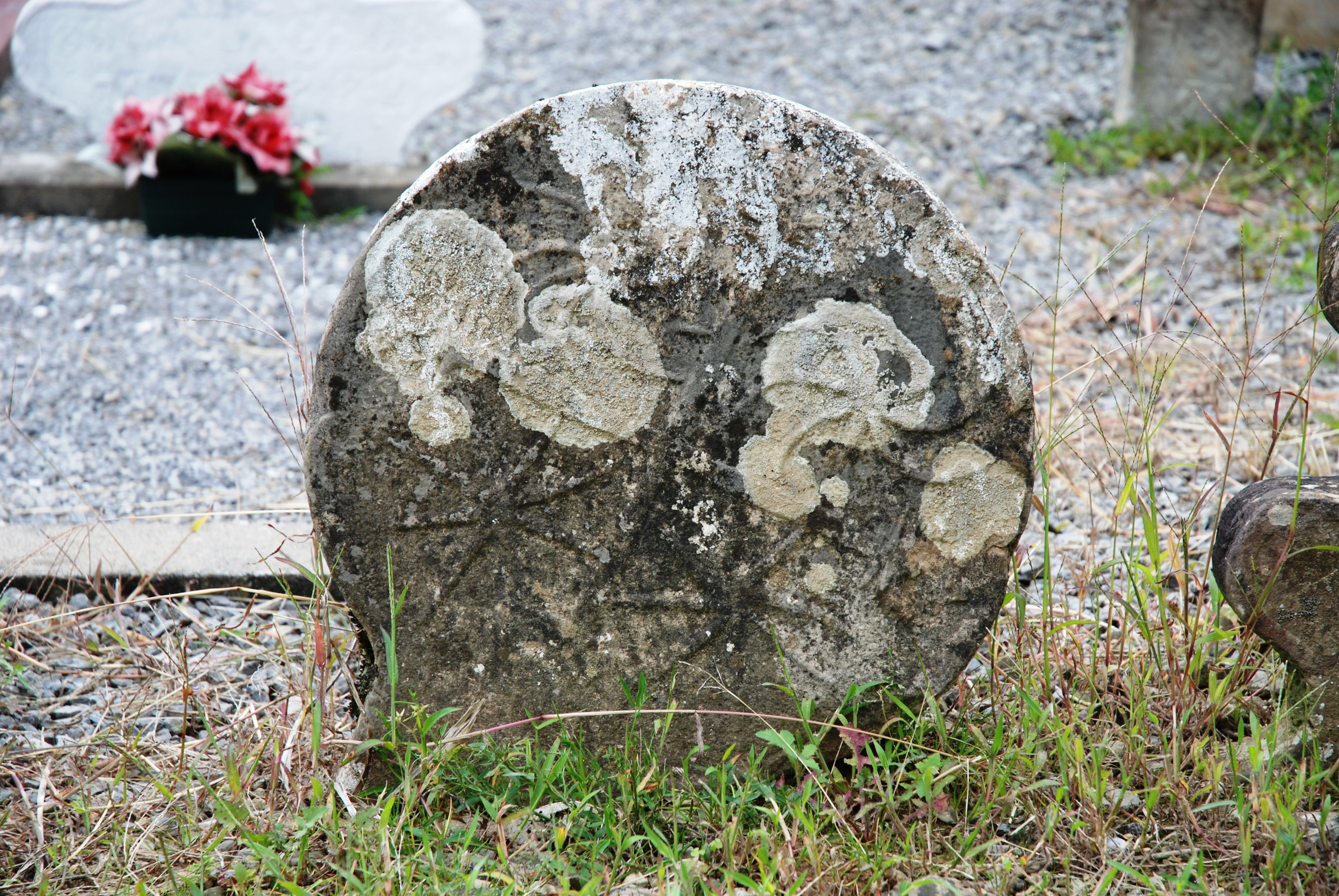 Lecumberry, stèle discoïdale